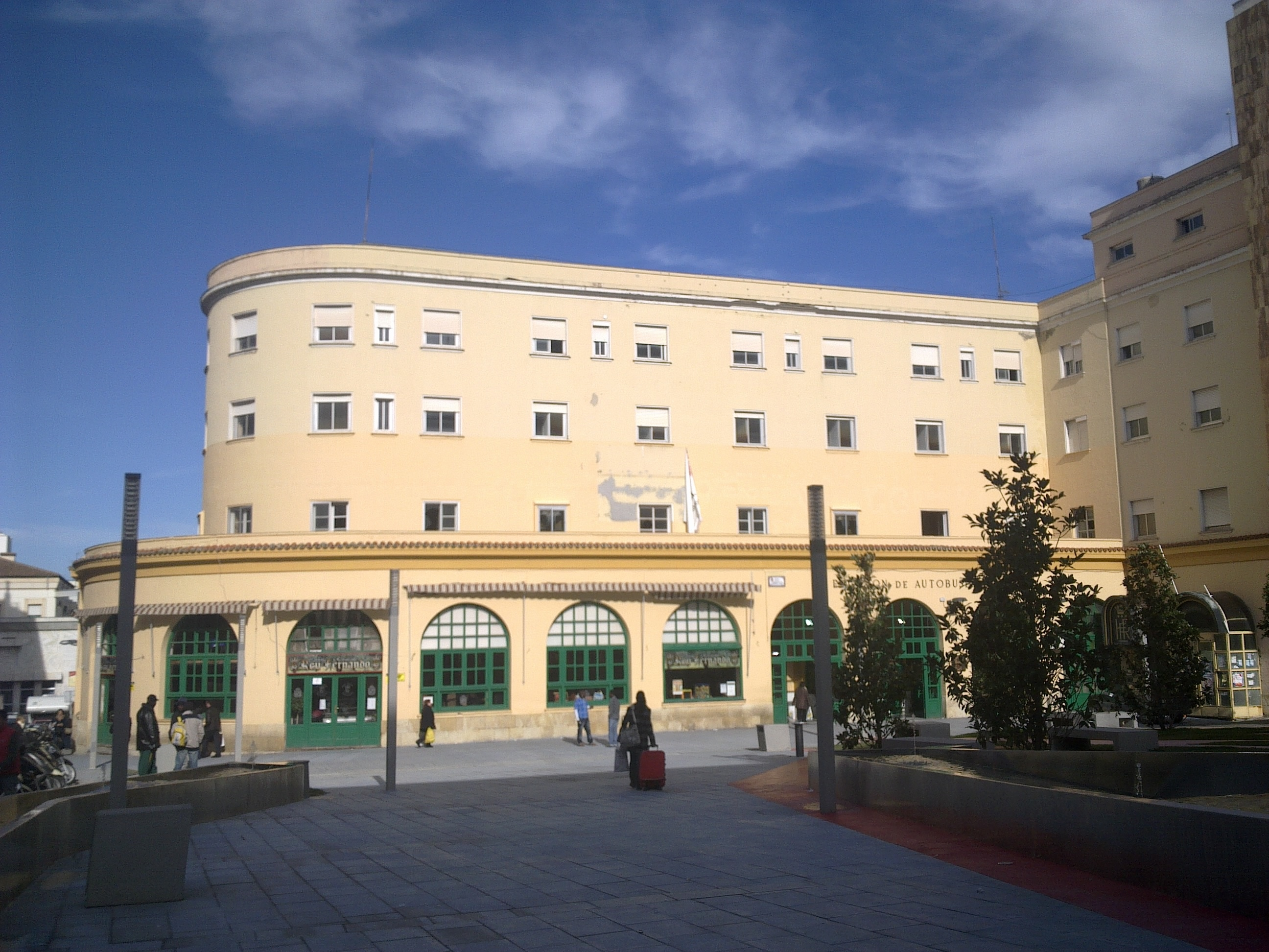 Estación de autobuses de Jaén.